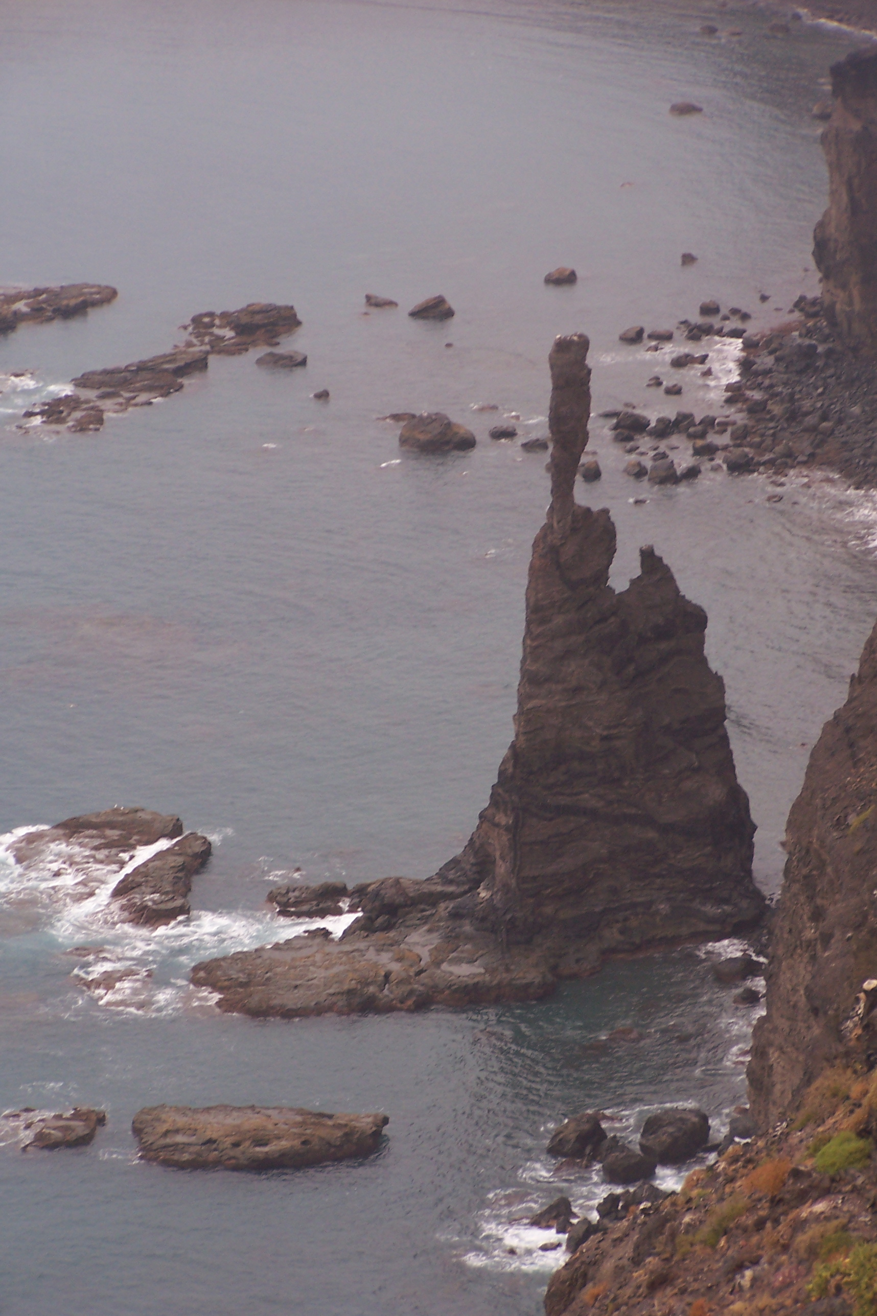 Fotograf: Michael Kainzbauer Das Bild zeigt den Dedo de Dios vor dem Tropensturm "Delta" // "Dedo de Dios", Roque Partido, Agaete (Gran Canaria) Antede de romperse por motivo de la Tormenta Tropical "Delta".